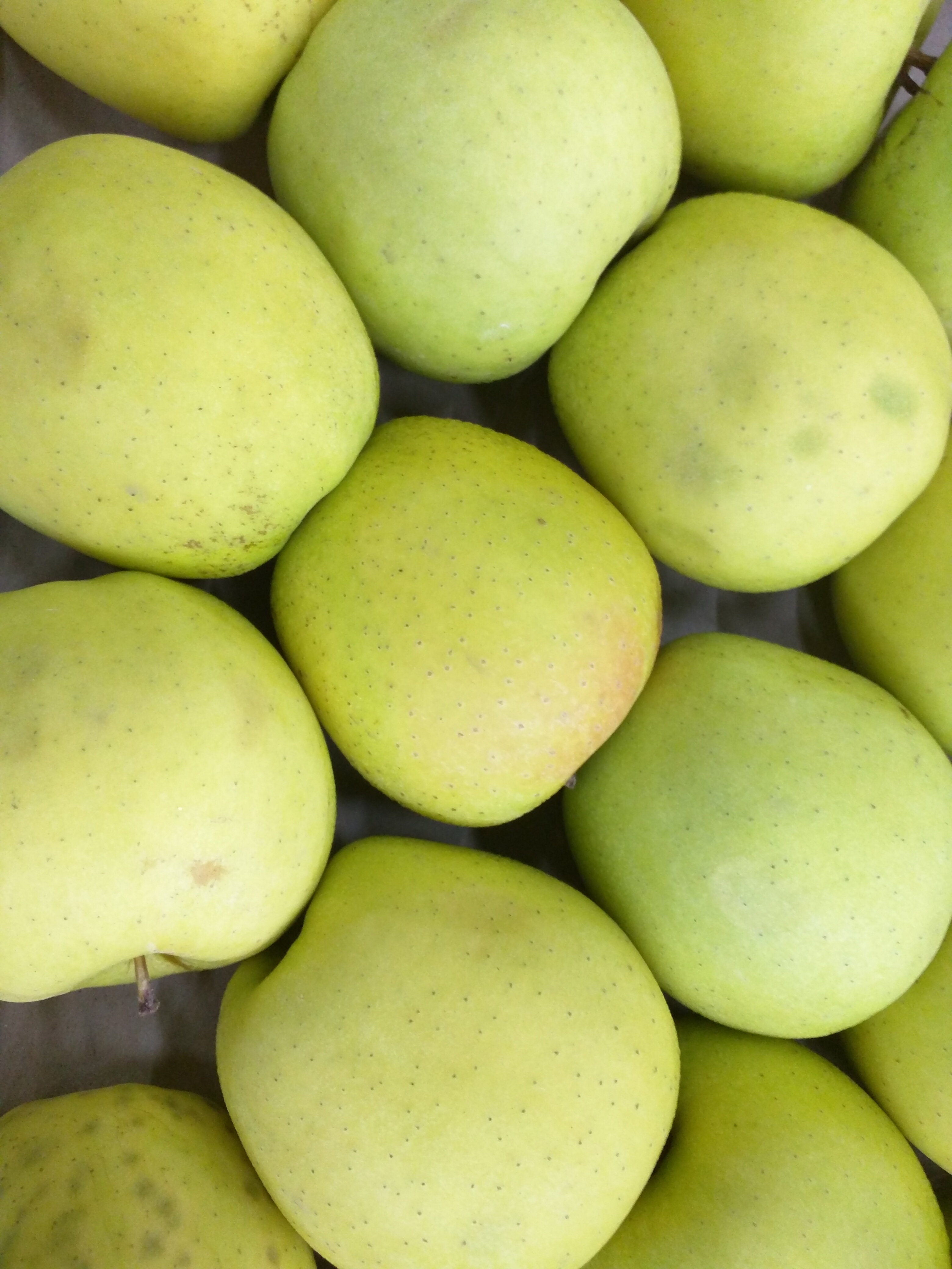 mele golden